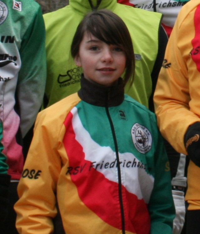 Europameisterin Liane Lippert Januar 2009